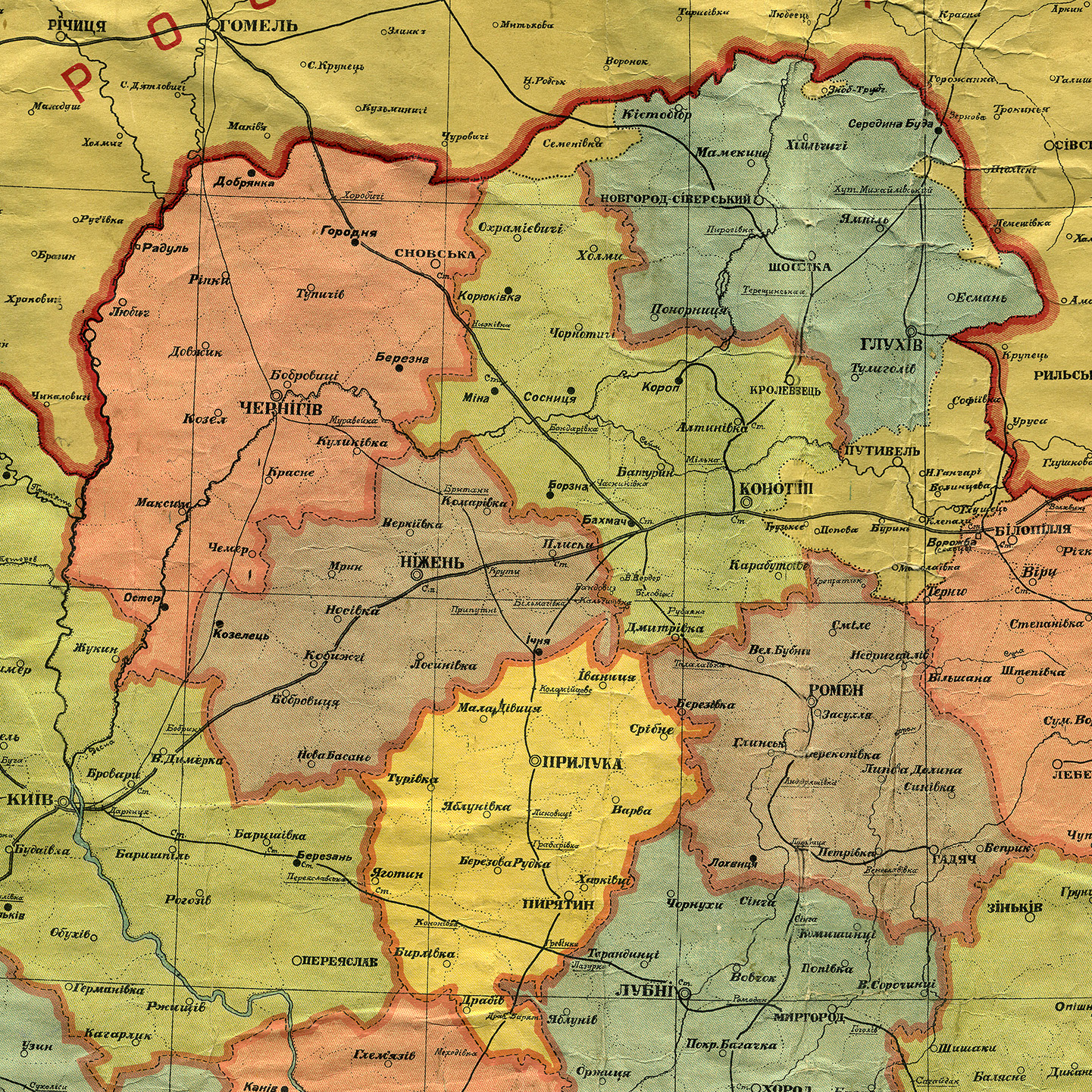 Територія колишньої Чернігівської губернії, фрагмент мапи Української соц. рад. республіки, адміністративний поділ від 1 жовтня 1925